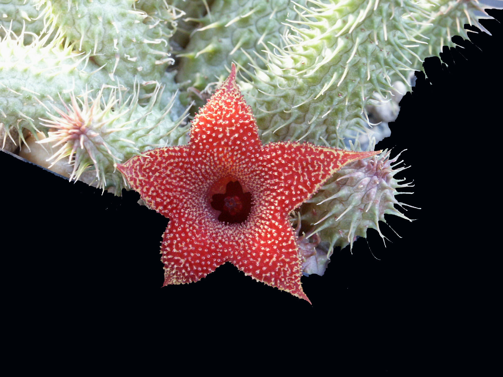 Huernia